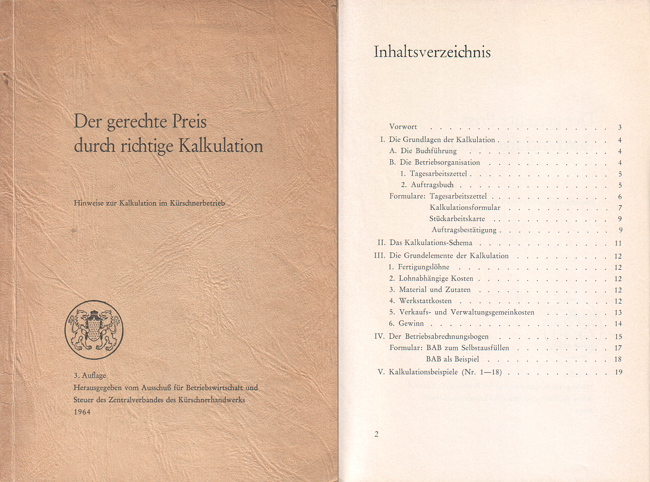 Der gerechte Preis durch richtige Kalkulation. Hinweise zur Kalkulation im Kürschnerhandwerk. 3. Auflage. Herausgegeben vom Ausschuß für Betriebswirtschaft und Steuer des Zentralverbandes des Kürschnerhandwerks; 1964. Paperback, 27 Seiten, 14,5 x 21 cm